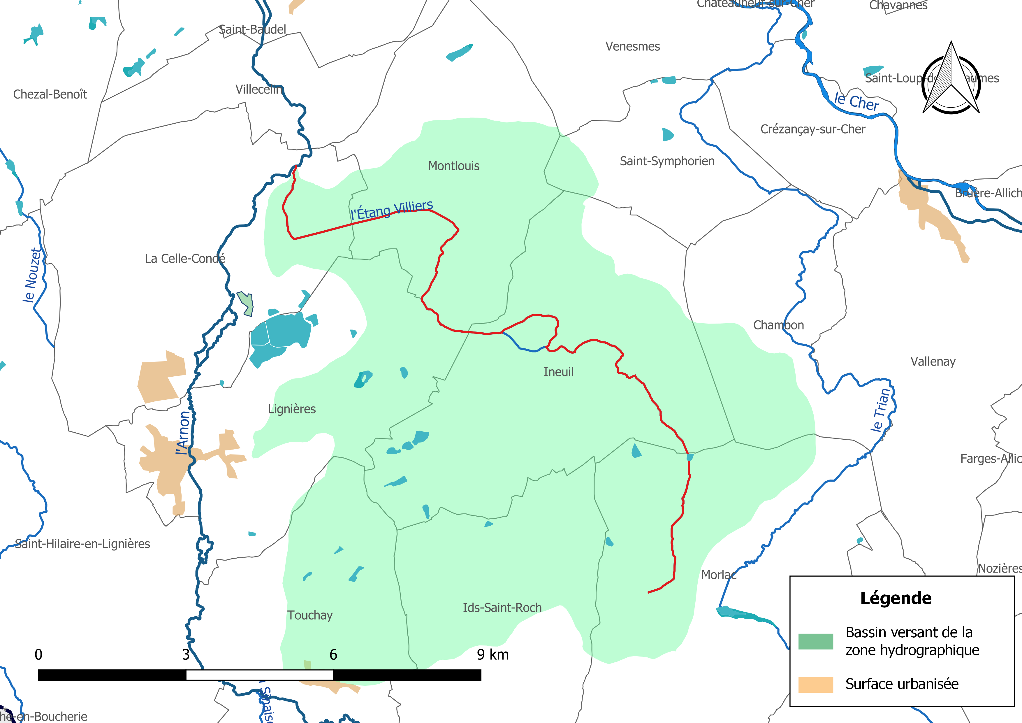 Carte du cours d'eau « Étang Villiers » (France) et de la zone hydrographique dans laquelle il s'insère.